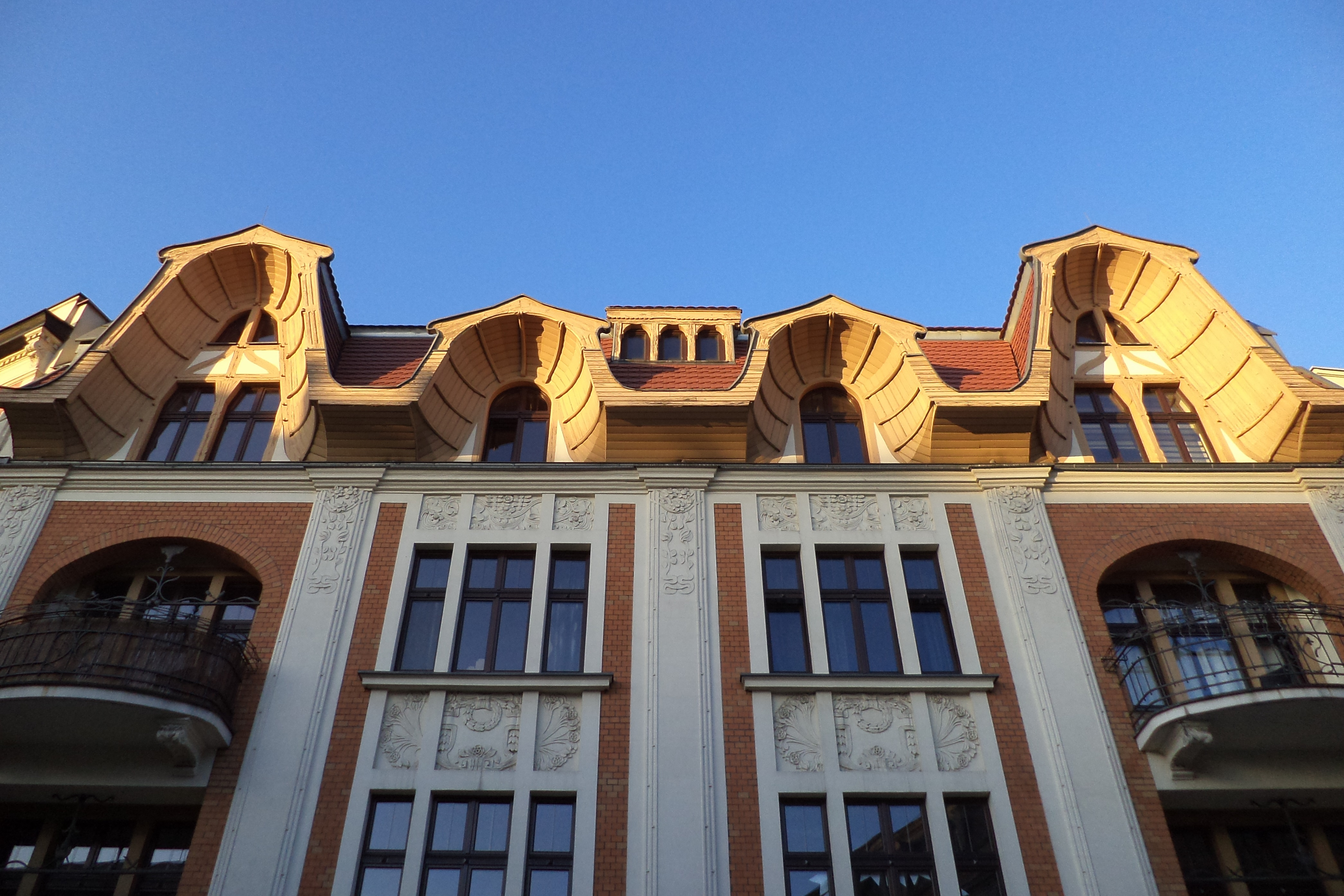 Secesyjna kamienica przy ul. Krakowskiej 16 w Tarnowskich Górach